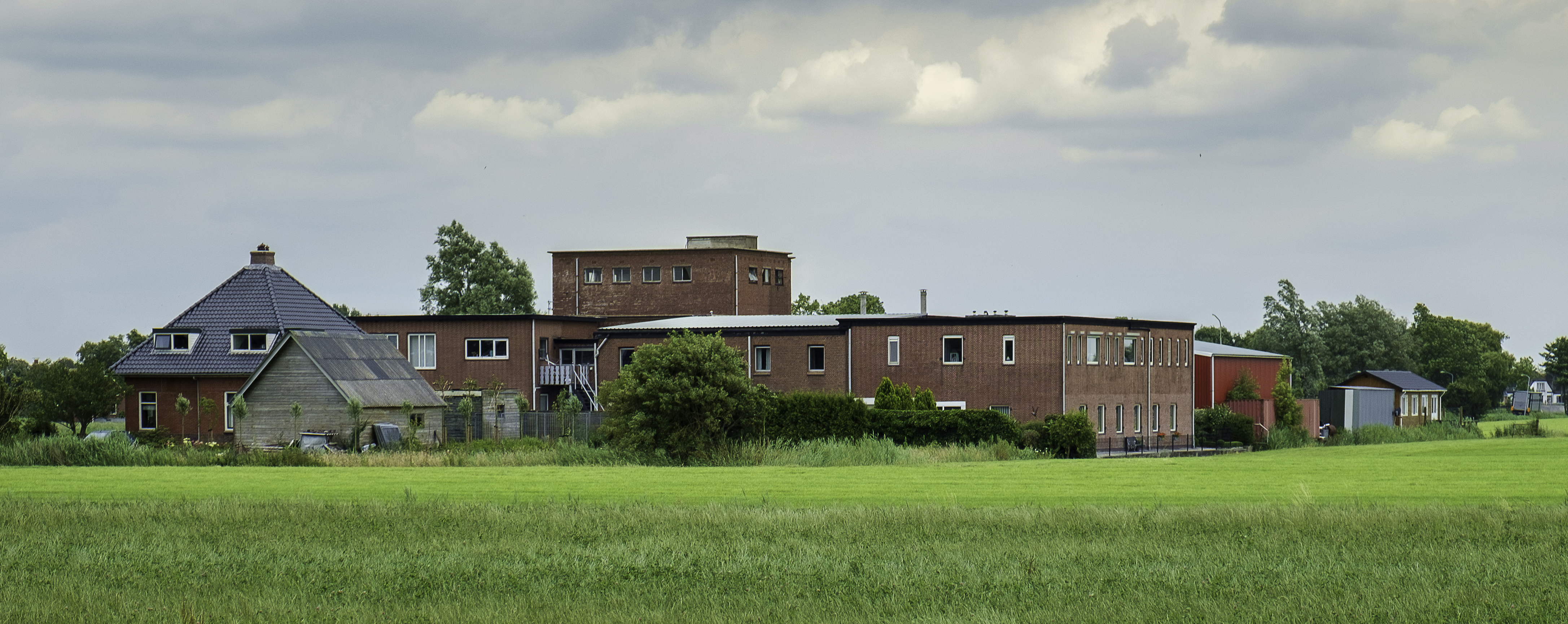 oude steenfabriek van Ezinge